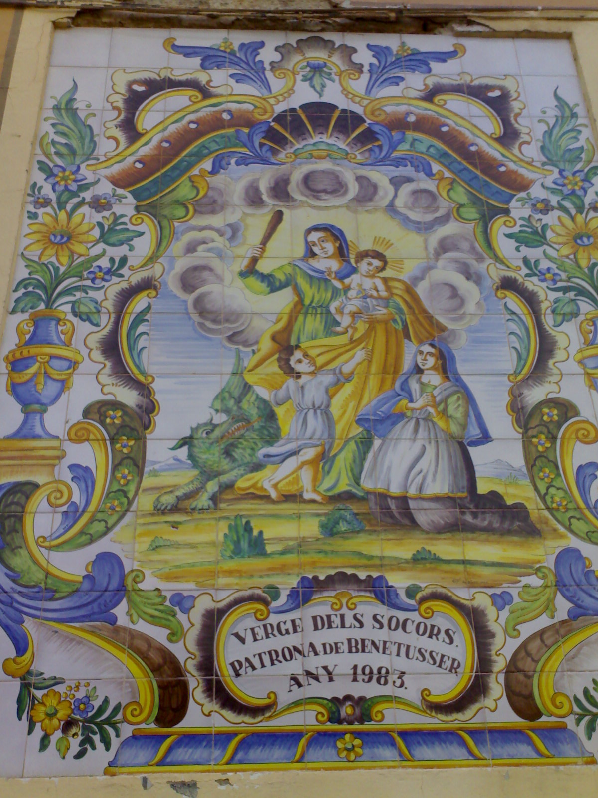 Imagen de la Patrona de Benetússer, en Valencia (España)